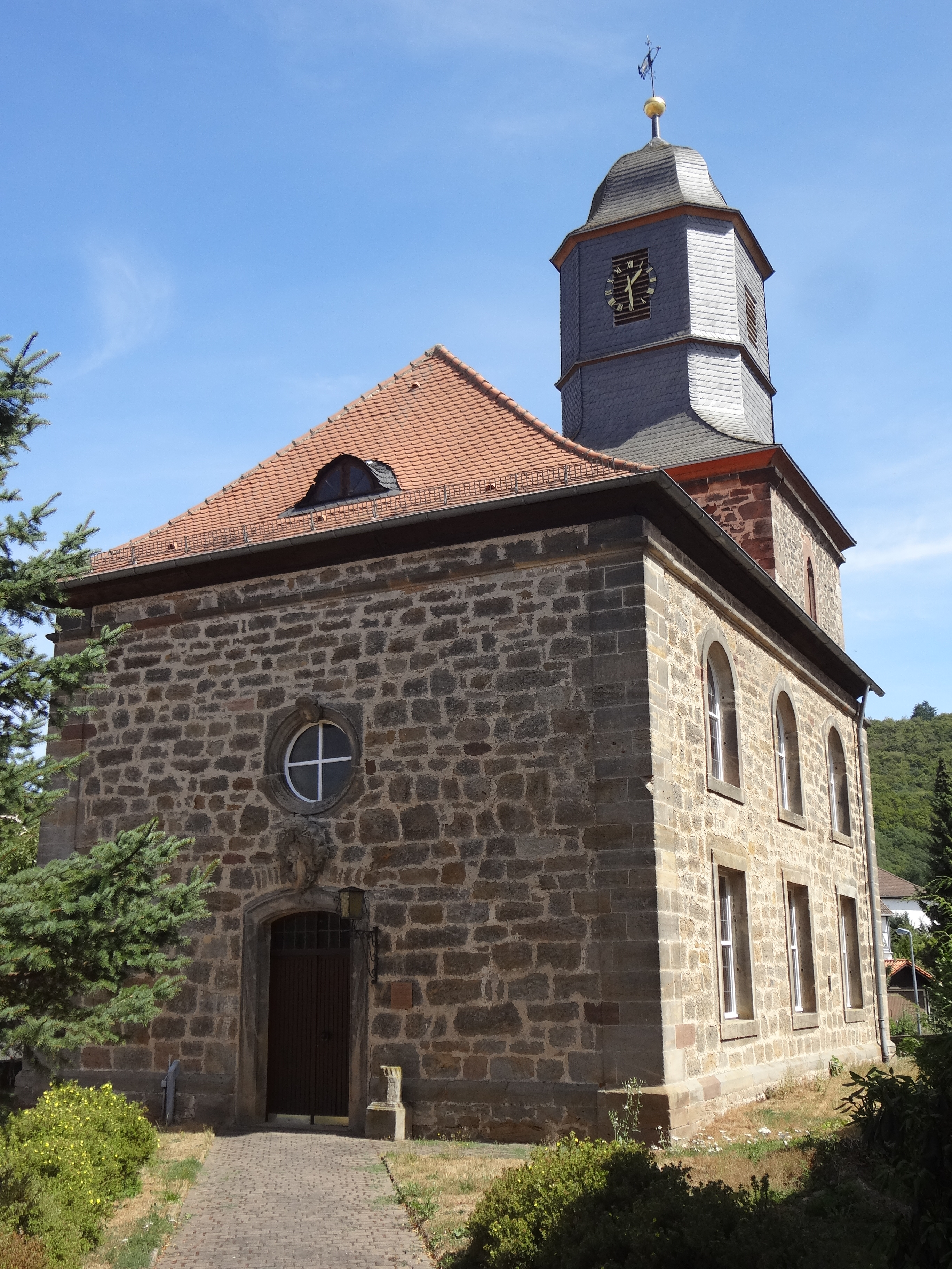 Hlg. Margarete Kirche in Sondheim (Homberg (Efze)).